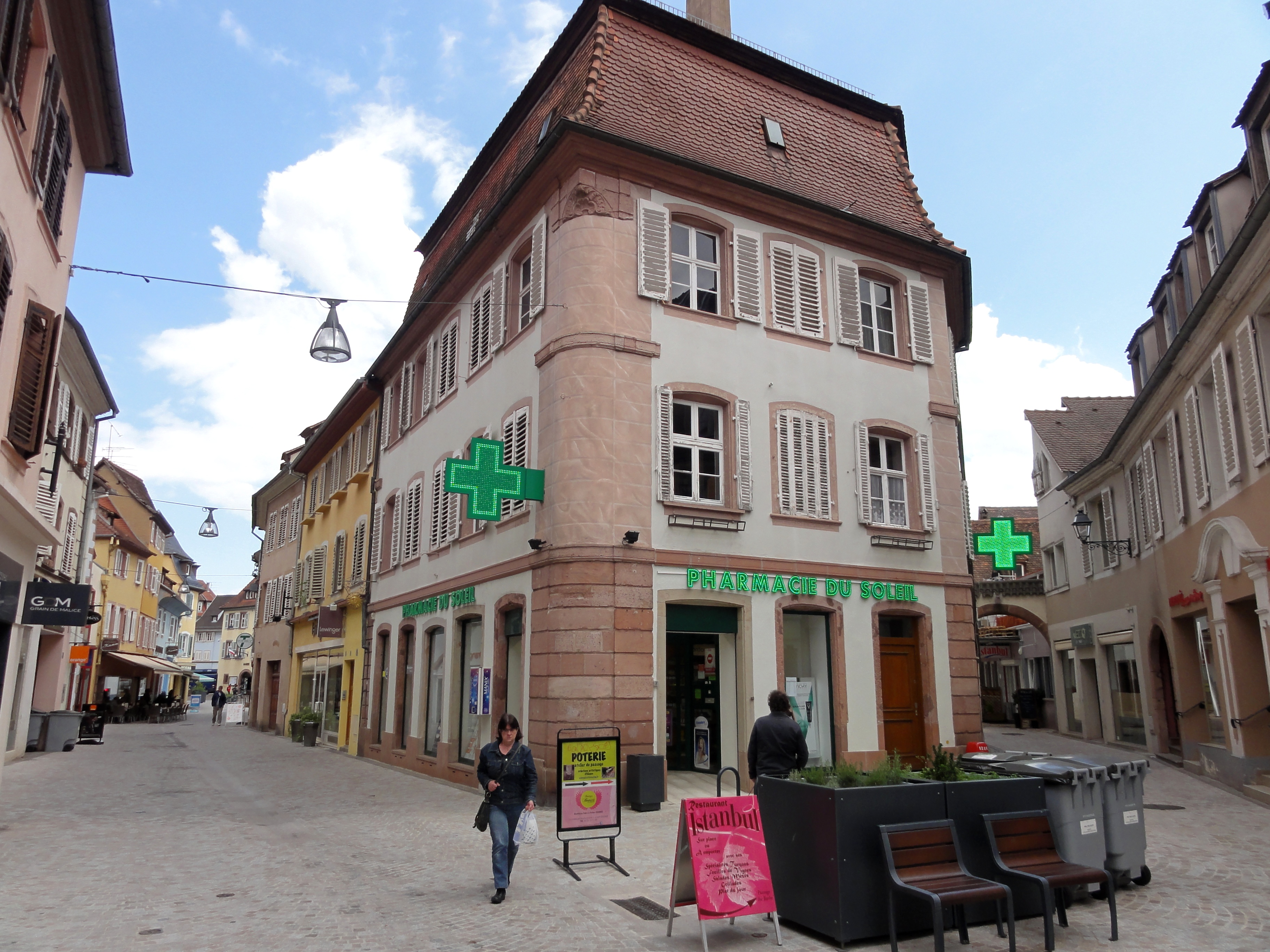 Alsace, Bas-Rhin, Sélestat, Pharmacie du Soleil (XIXe), 6 rue des Clés.